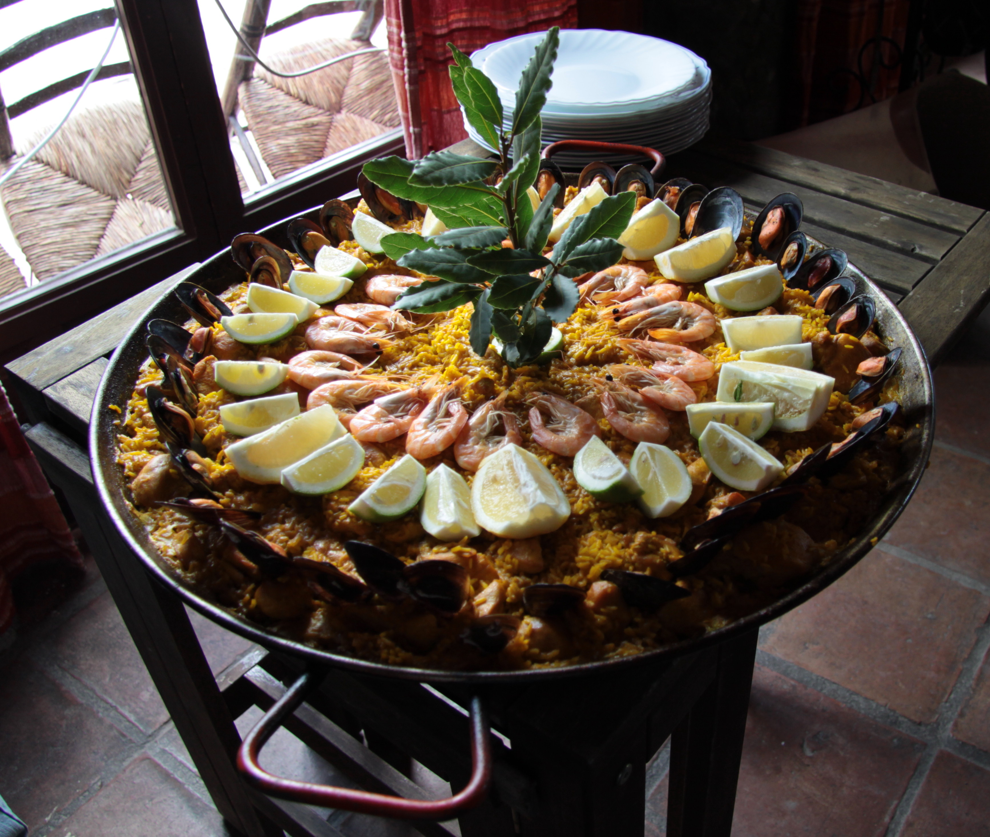 Paella in einem Restaurant, optisch gestaltet